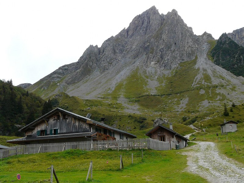 Refuge de la Balme et l'aiguille de la Pennaz